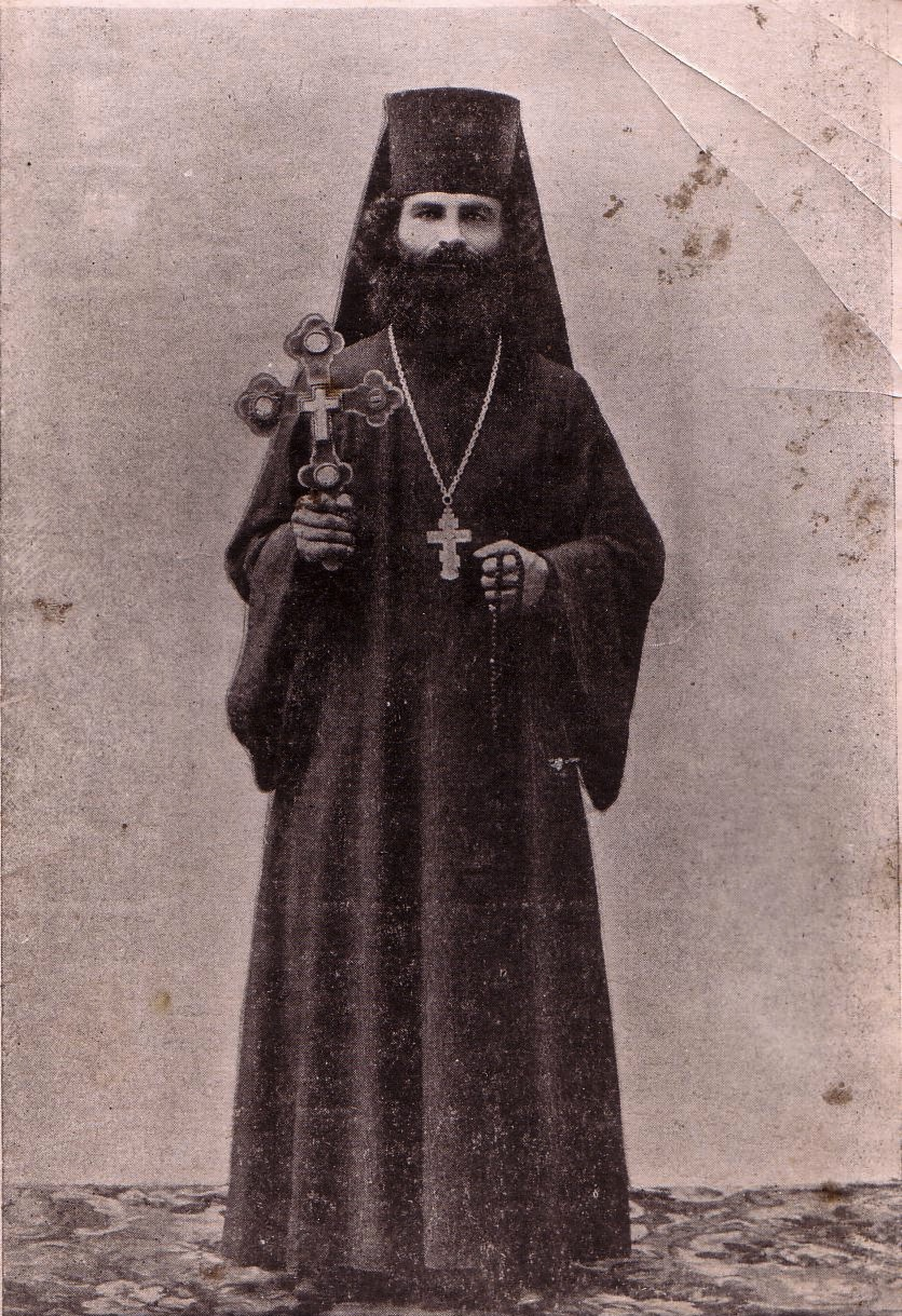 Inochenție of Balta, Moldavian monk